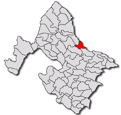 Categorie:Hărţi ale judeţului Mehedinţi